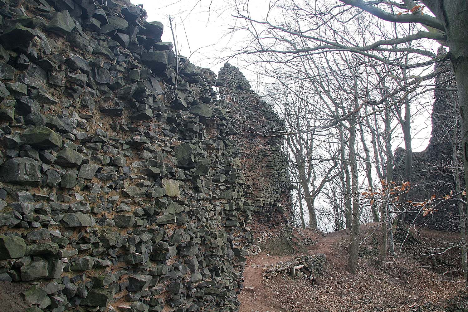 Pozůstatky hradního paláce s okrouhlou baštou při pohledu zevnitř Castle Bradlec, district Semily autor: Prazak date: 23. 2. 2007